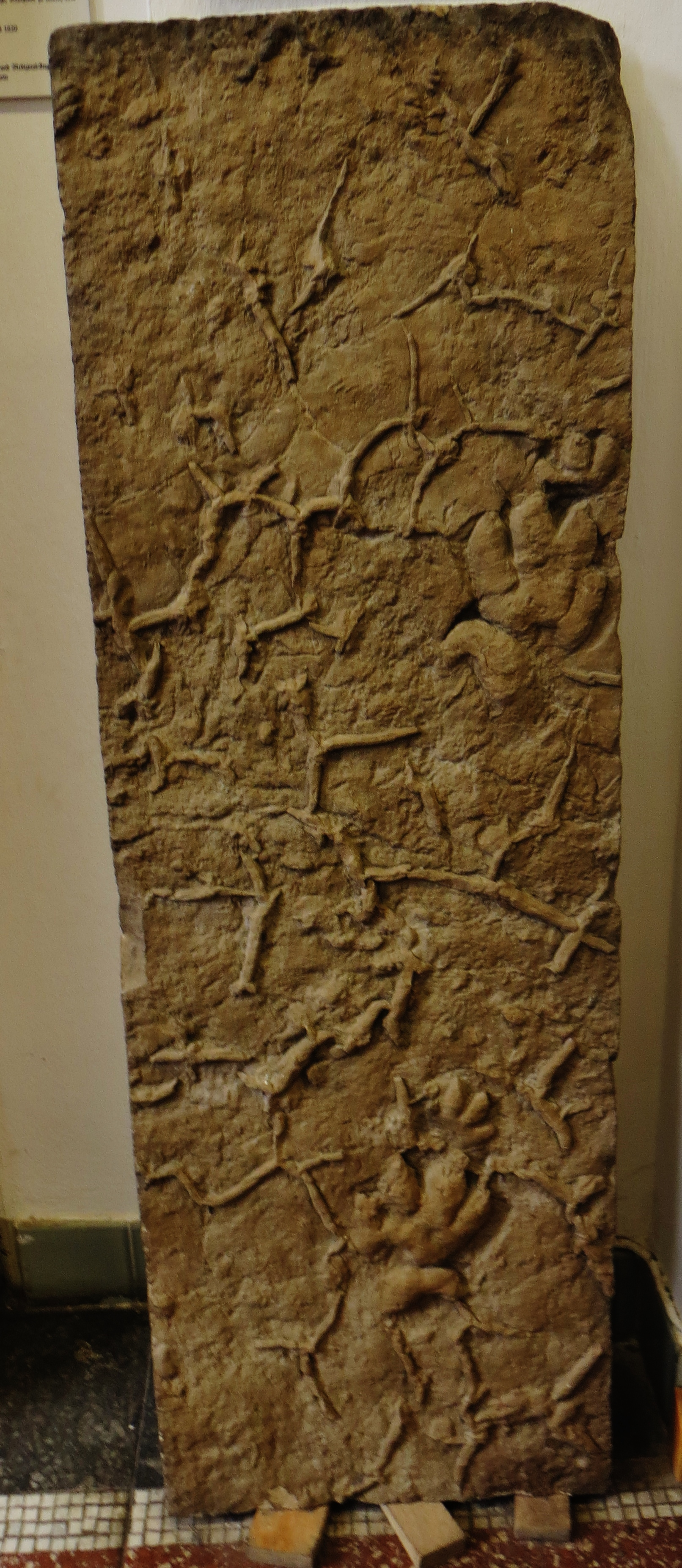 Sandstone slab with casts of mudcracks and trace fossil species Chirotherium barthii on its lower surface, on display in the Natural History Museum (Goldfuß-Museum), Bonn University, Germany. This slab belongs to the original material from the Chirotherium Sandstone Member of the Solling Formation of the Middle Buntsandstein of Hildburghausen, Thuringia, Germany, based on which this ichnospecies was first described scientifically in 1835 (first scientific desciption of a tetrapod trace fossil ever).[1] ↑ cf. fig. 16 (p. 16) in: Hartmut Haubold (2006): Die Saurierfährten Chirotherium barthii Kaup, 1835 - das Typusmaterial aus dem Buntsandstein bei Hildburghausen/Thüringen und das „Chirotherium-Monument“. Veröffentlichungen des Naturhistorischen Museums Schleusingen. 21: 3-31